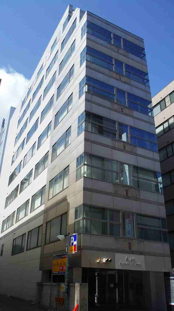 名古屋本社